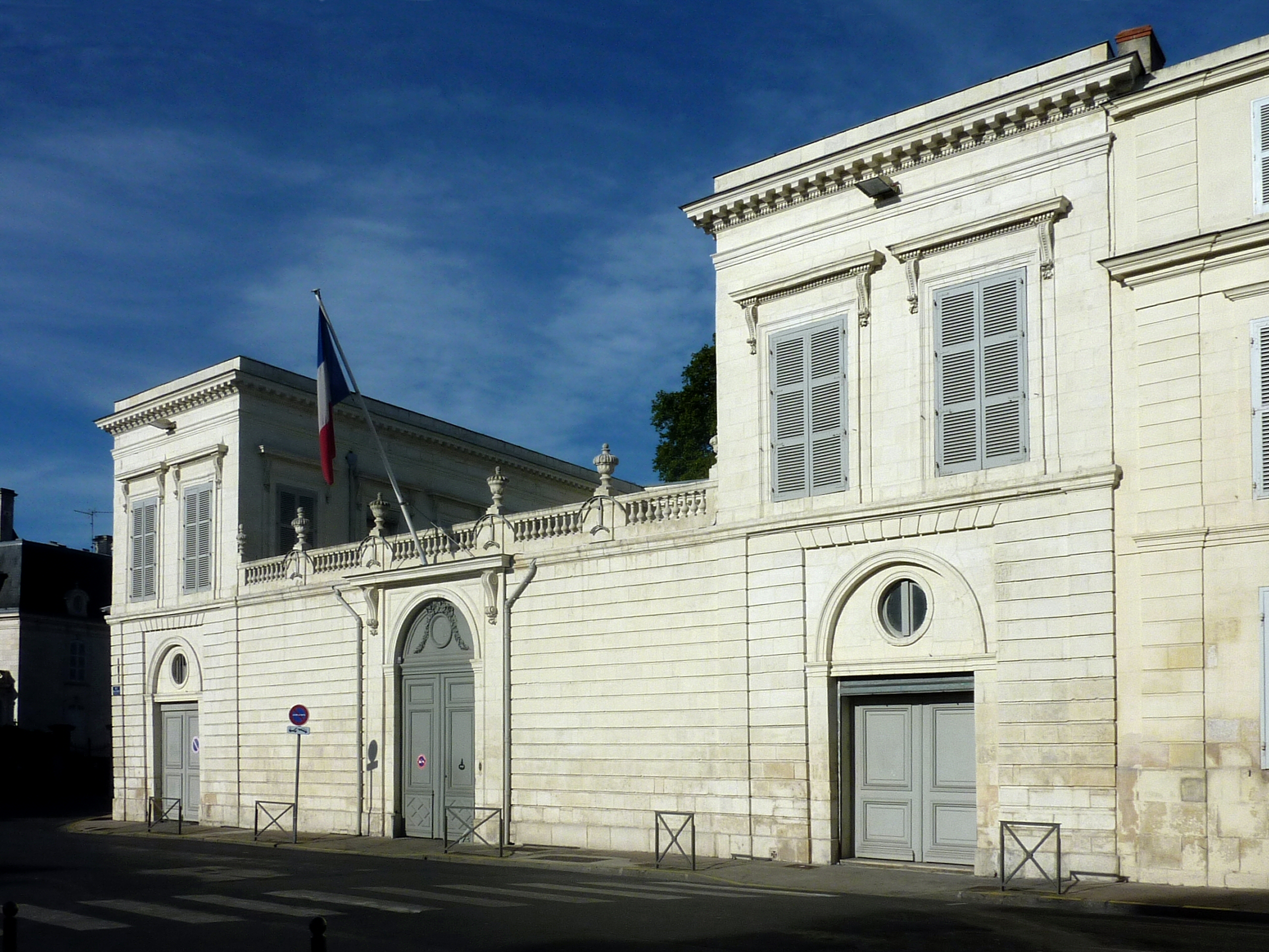 Hôtel Poupet 40 rue Réaumur, un des trois hôtels particuliers constituant la Préfecture de La Rochelle Charente Maritime France .